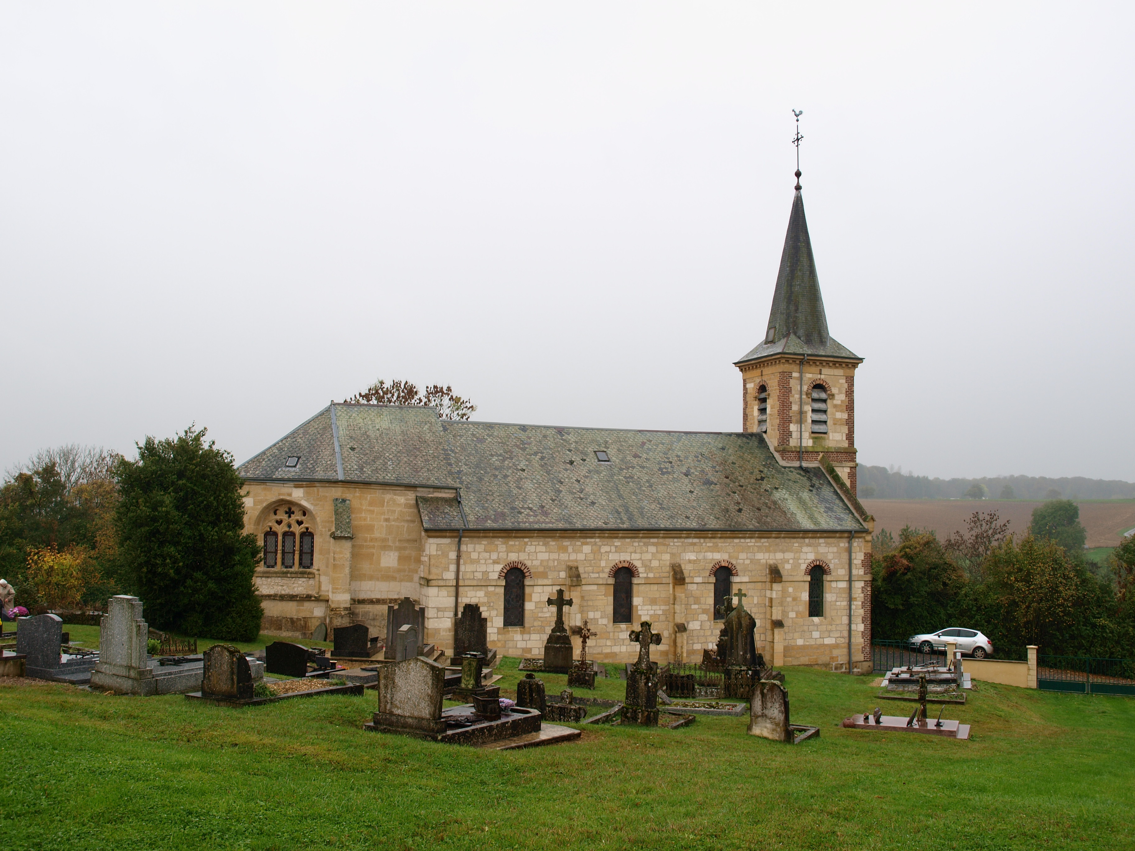 Marquigny (Ardennes, France) ; église